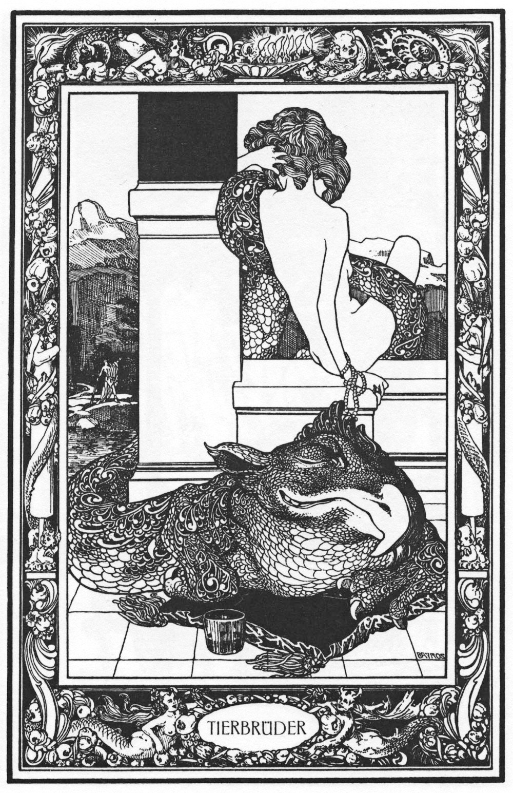 Illustration for Giambattista Basile's "Pentamerone".